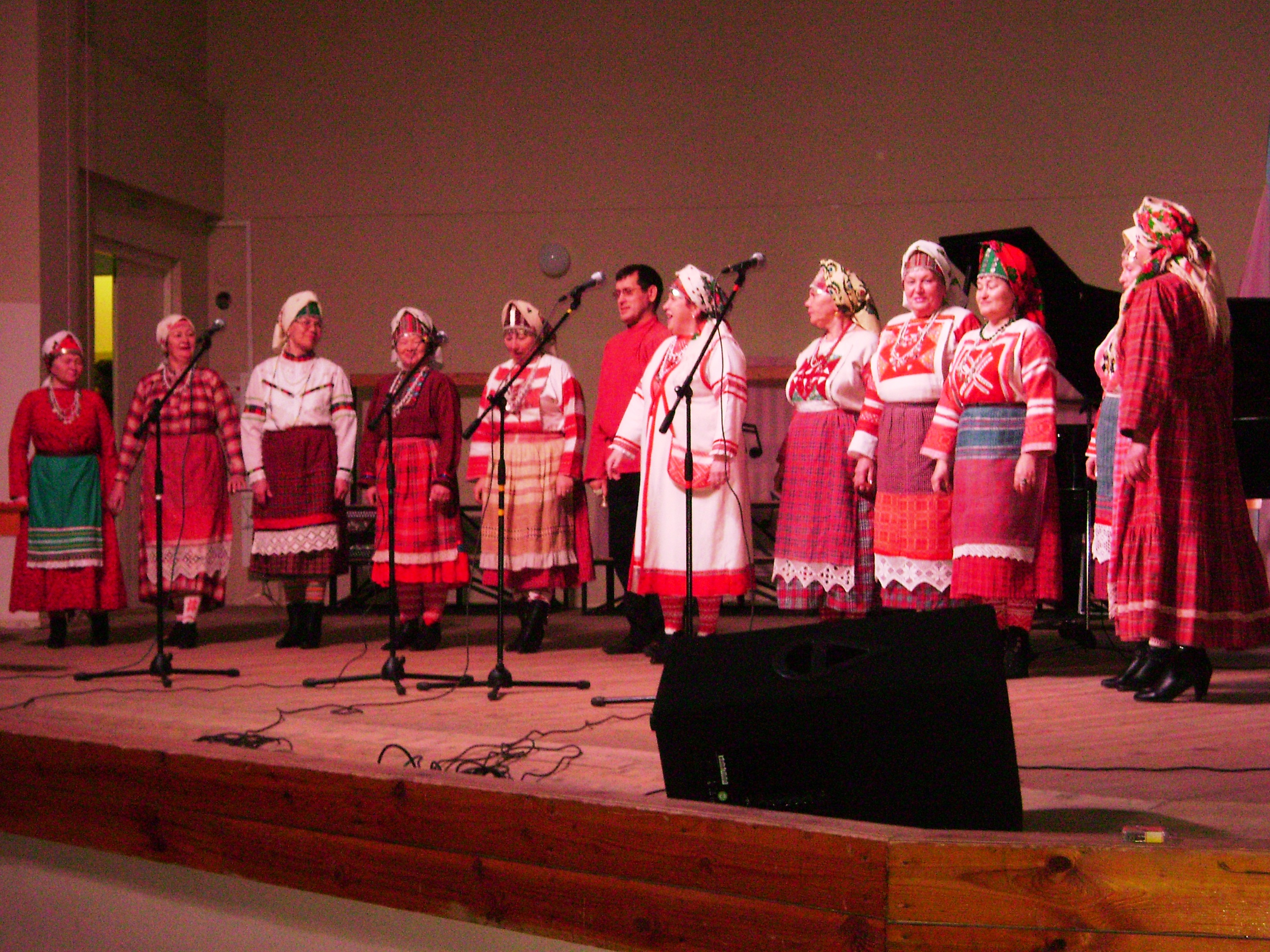 Народный ансамбль "Чупчи гурьёс / Чепецкие напевы" (дер. Штанигурт, северные удмурты). На выступлении в Глазовском пединституте